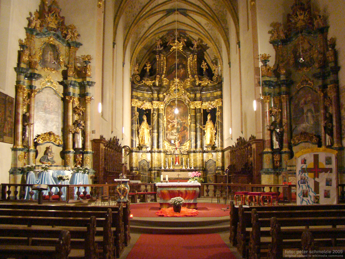 Blick zum Chor der Dominikanerkirche in Bad Wimpfen